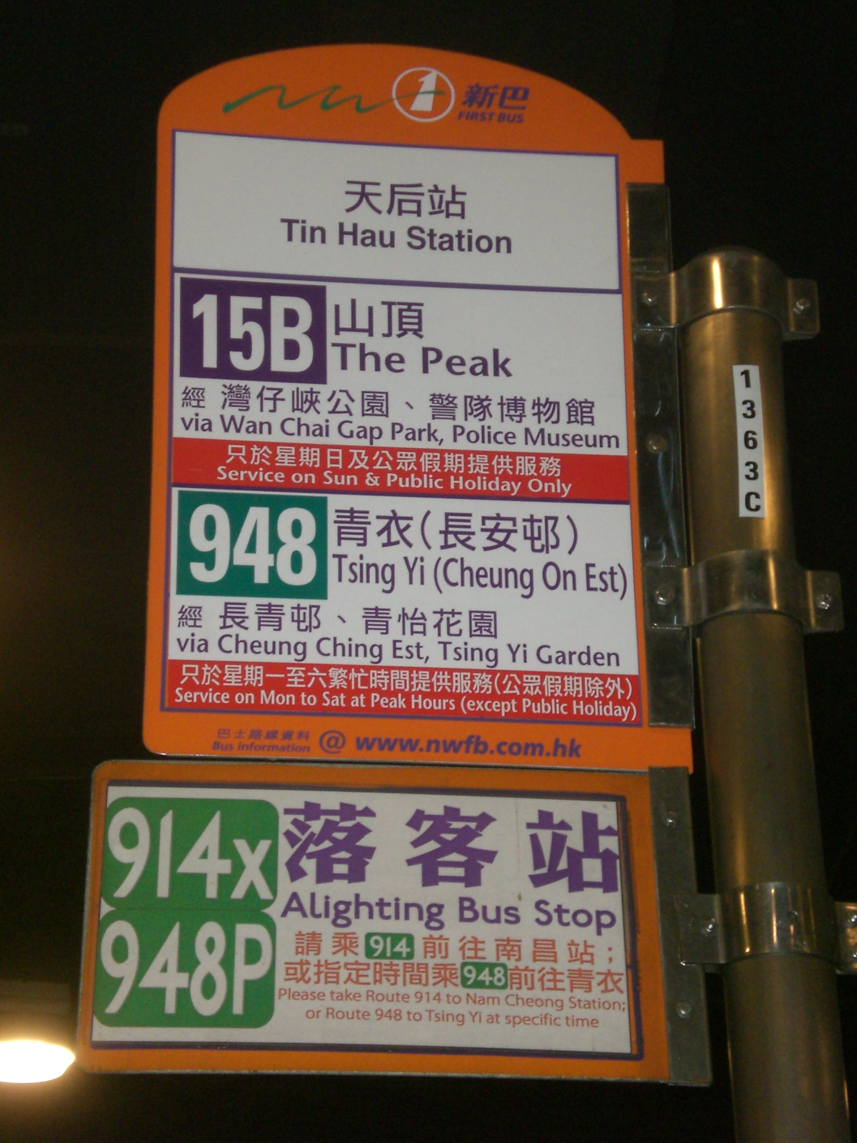 香港島英皇道1號柏景臺基層，天后站公共運輸交匯處